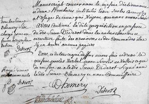 Procès-verbal de perquisition chez Diderot. Son contenu n'était connu que par une copie très incomplète des Archives de la Bastille. Le seul livre saisi chez lui fut la Lettre sur les Aveugles (bien lisible ici), et non pas La Promenade du sceptique, comme on l'avait pensé.